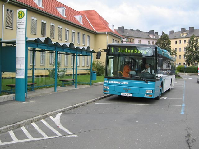 Haltestelle Bahnhof in Knittelfeld, Steiermark, Österreich.